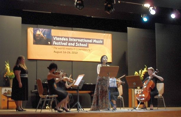 Vianden International Music Festival and School. Keng besser Foto fir den Ament do.